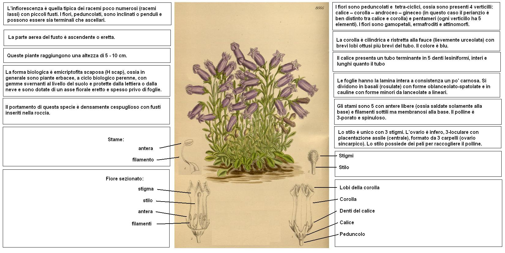 Favratia zoysii DESC